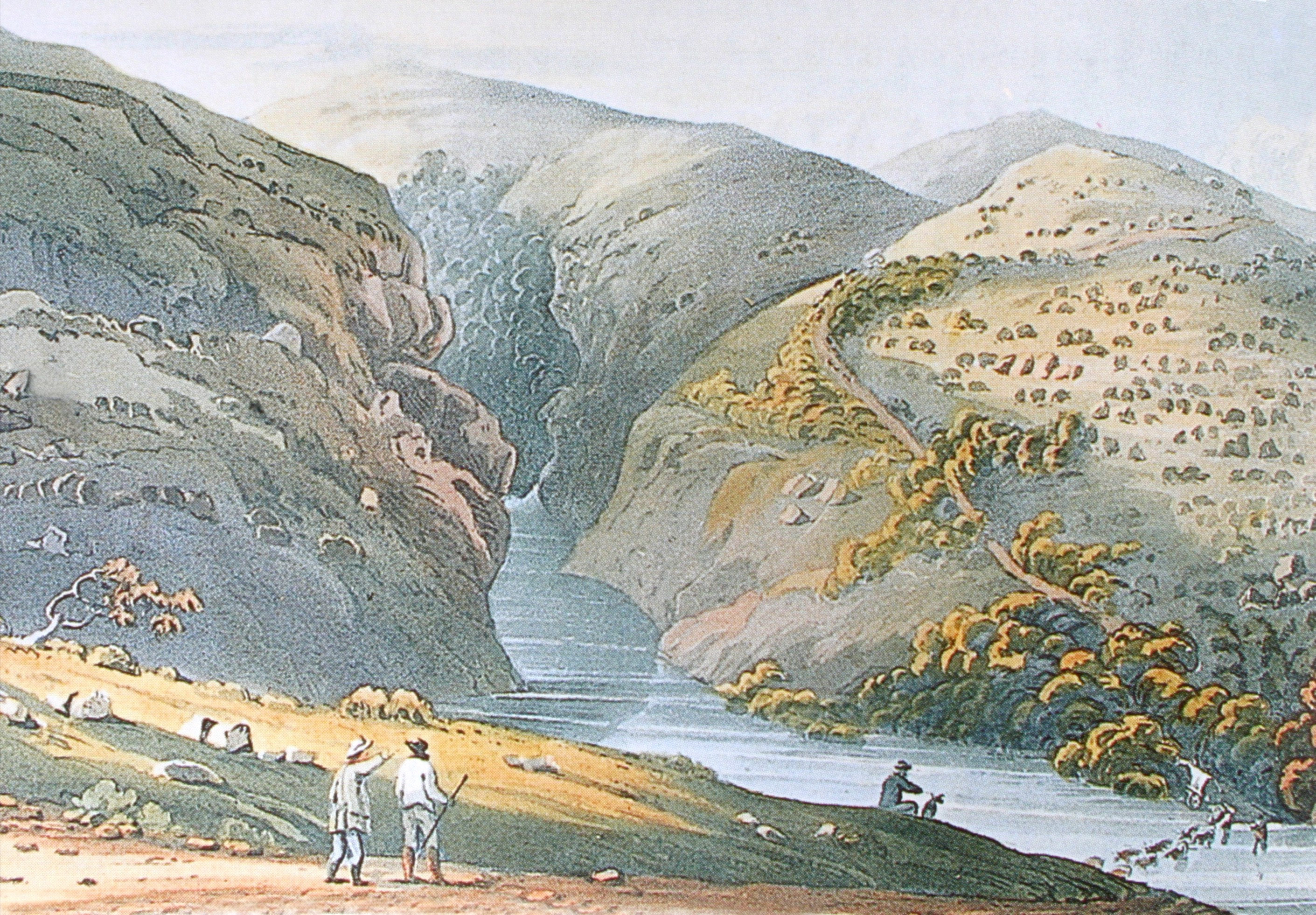 Painting of Kaaimansgat Pass